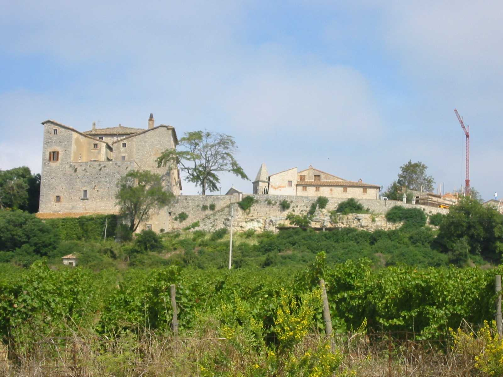 Titignano. Foto scattata in settembre 2004 da Fantasy :-)